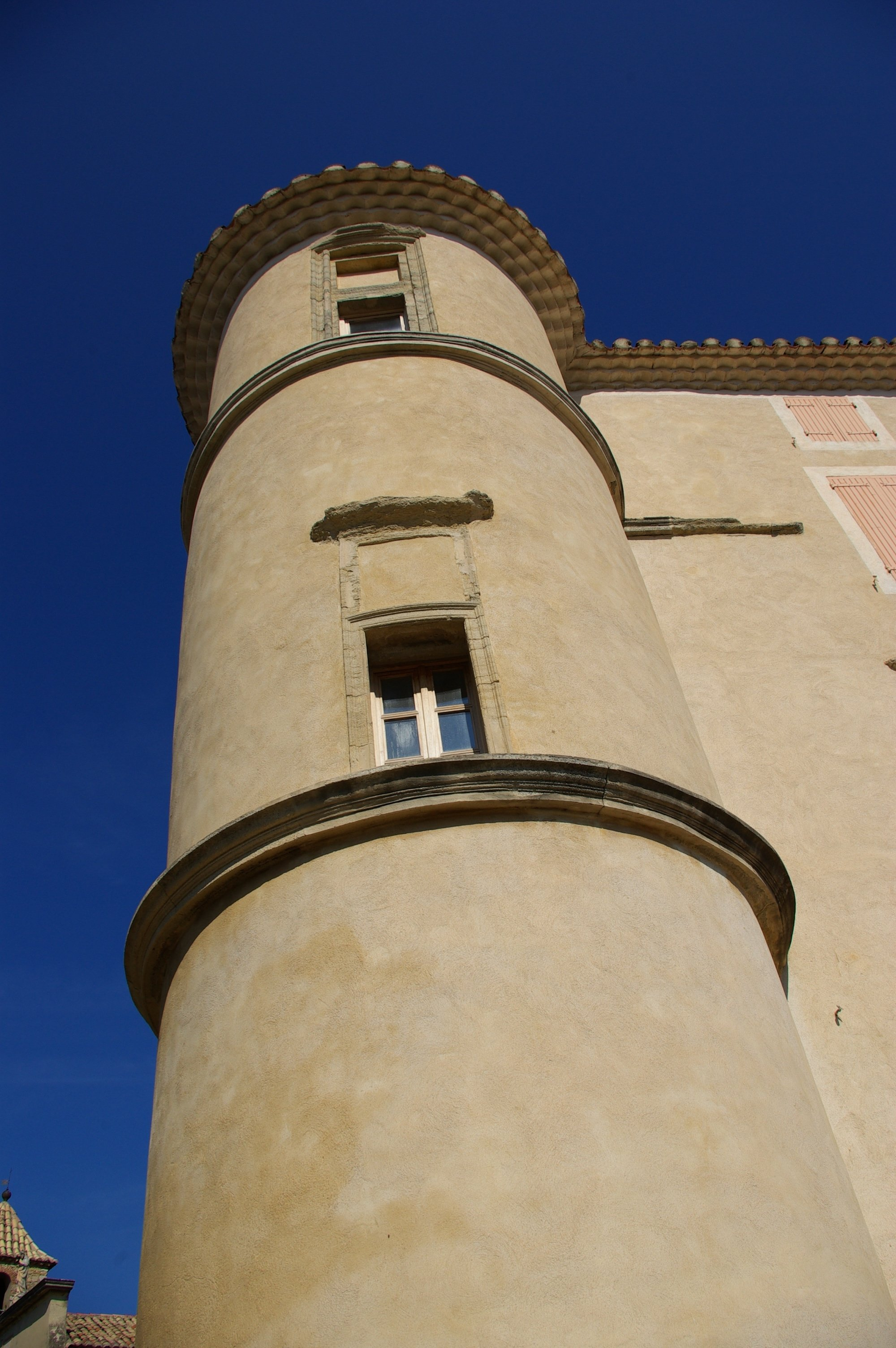 Tour du château féodal de Vacqueyras